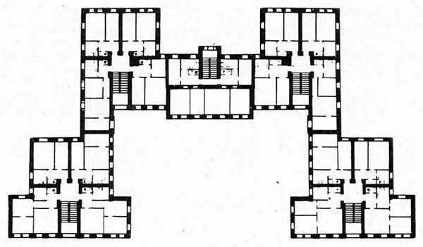 Віцебск. План дома камунальнага тыпу па вул. Суворава